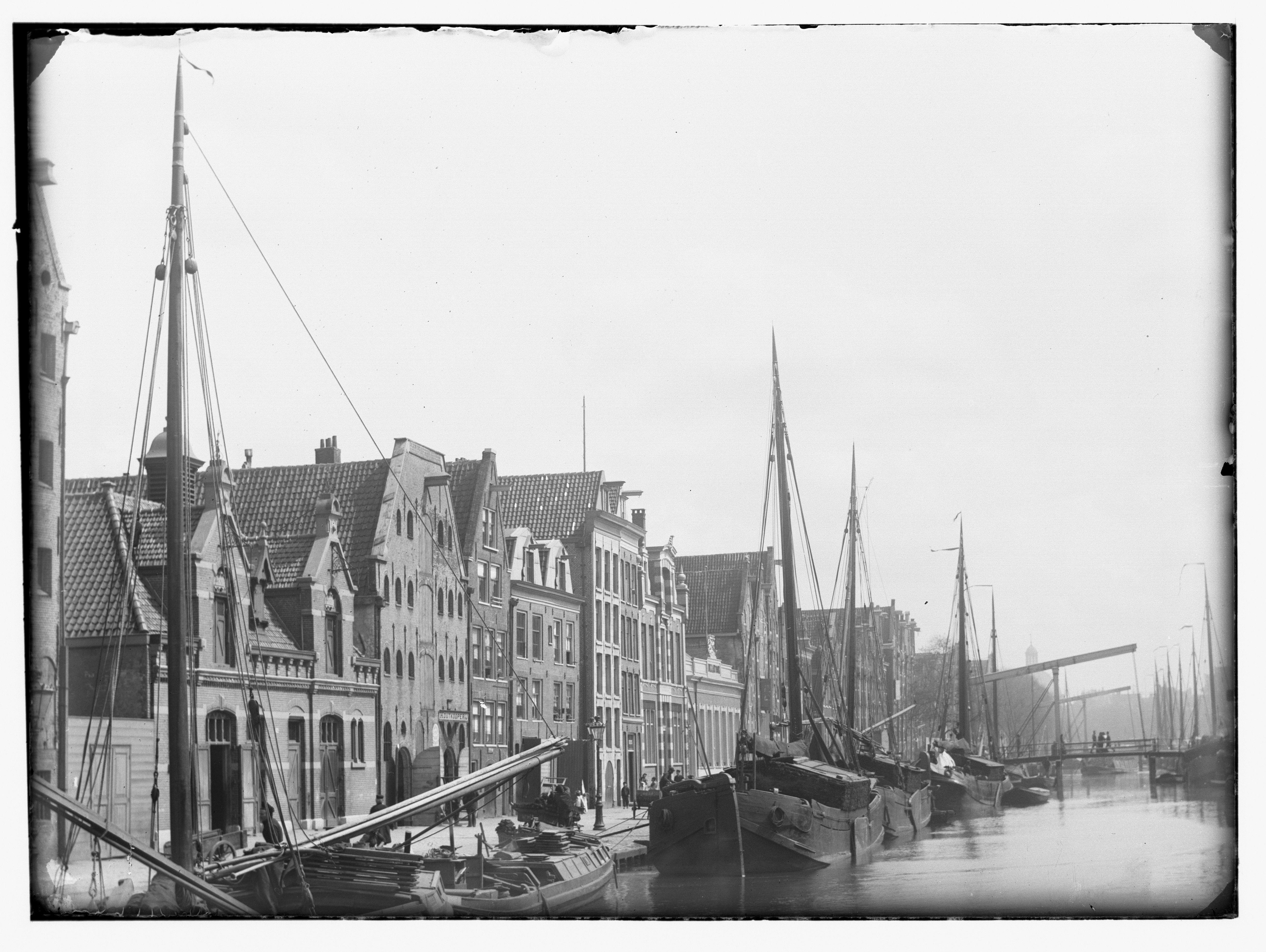 Beschrijving Brouwersgracht 300-298-296 enz. (v.l.n.r.) Gezien in oostelijke richting naar Prinsengracht met brug nr. 148 (voor) en brug nr. 146 (achter)``, respectievelijk voor Binnen Dommersstraat en Binnen Oranjestraat. Documenttype foto Vervaardiger Olie``, Jacob (1834-1905) Collectie Collectie Jacob Olie Jbz. Datering 1891 Geografische naam Brouwersgracht Inventarissen Afbeeldingsbestand 010019000255 Generated with Dememorixer